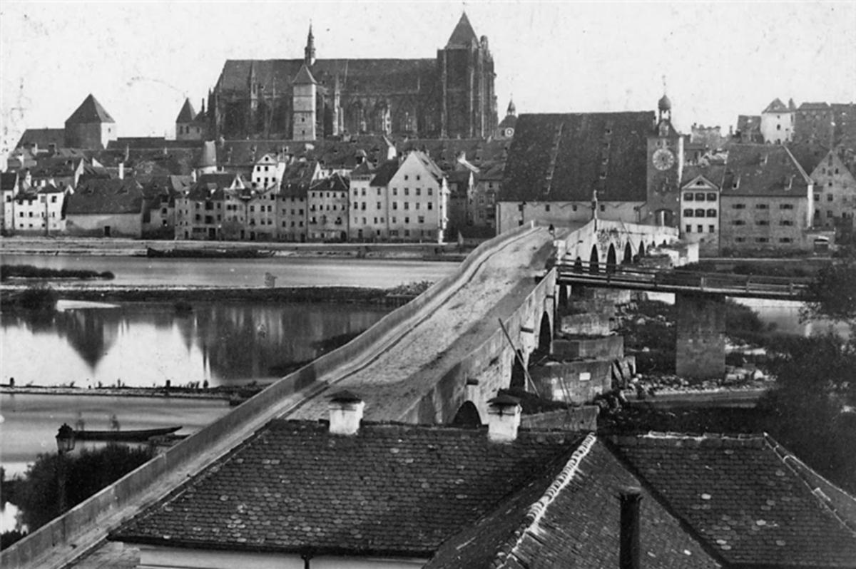 Photo - Regensburg - von Stadt am Hof